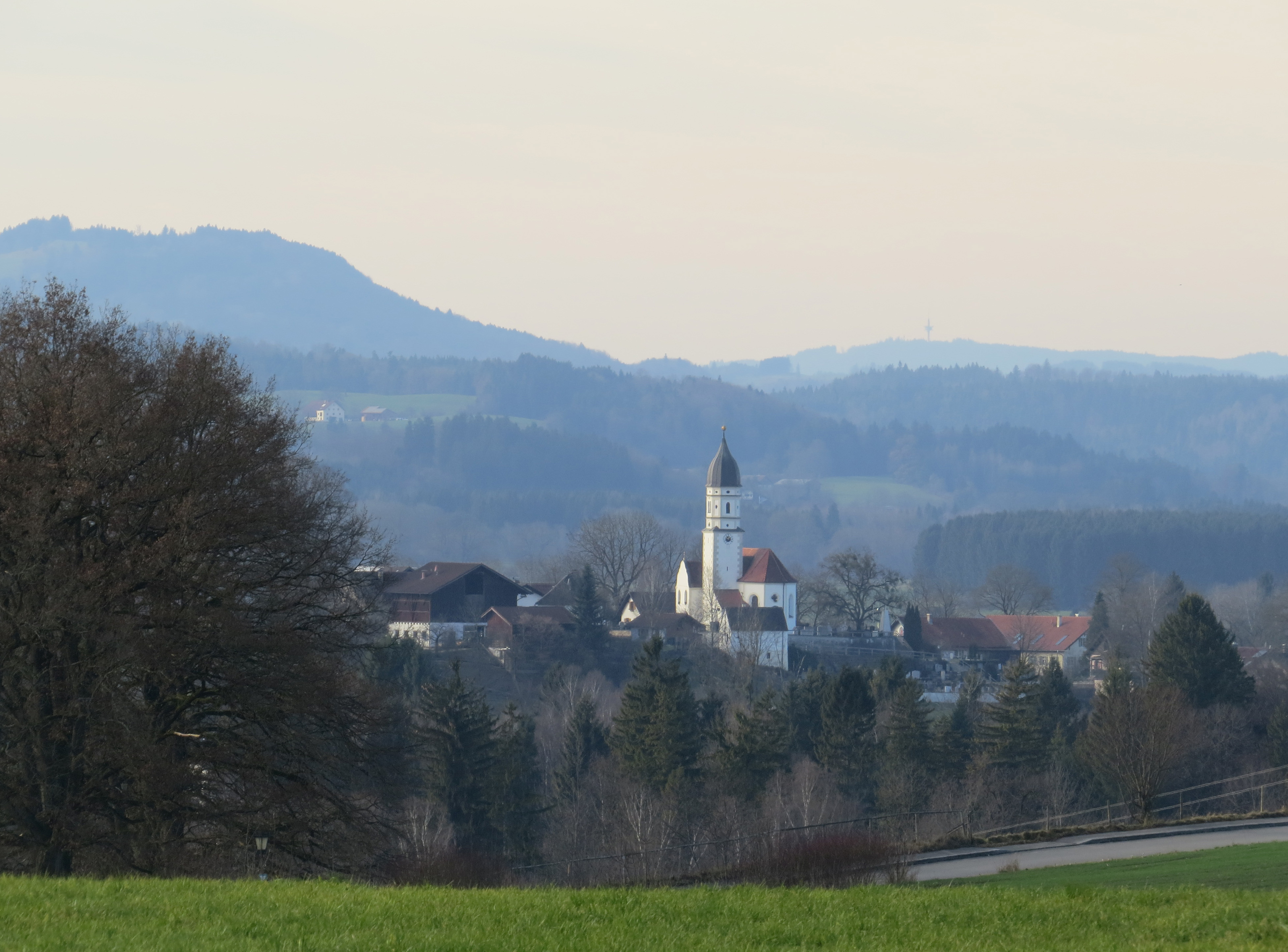 Oberhausen von Nordosten